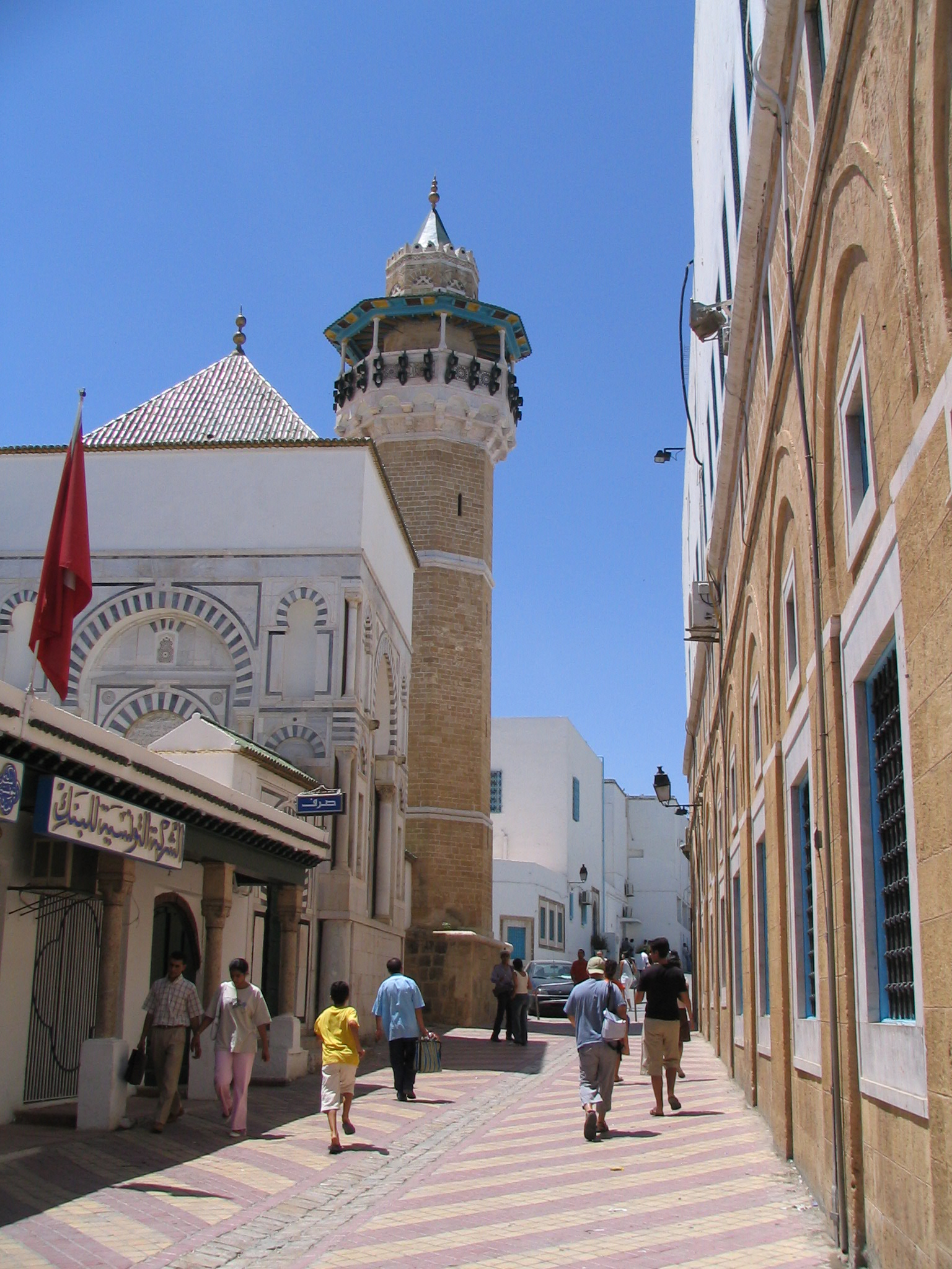 Mosquée de Youssef Dey à Tunis (Tunisie)